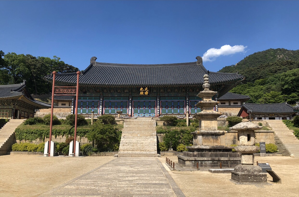 합천 해인사